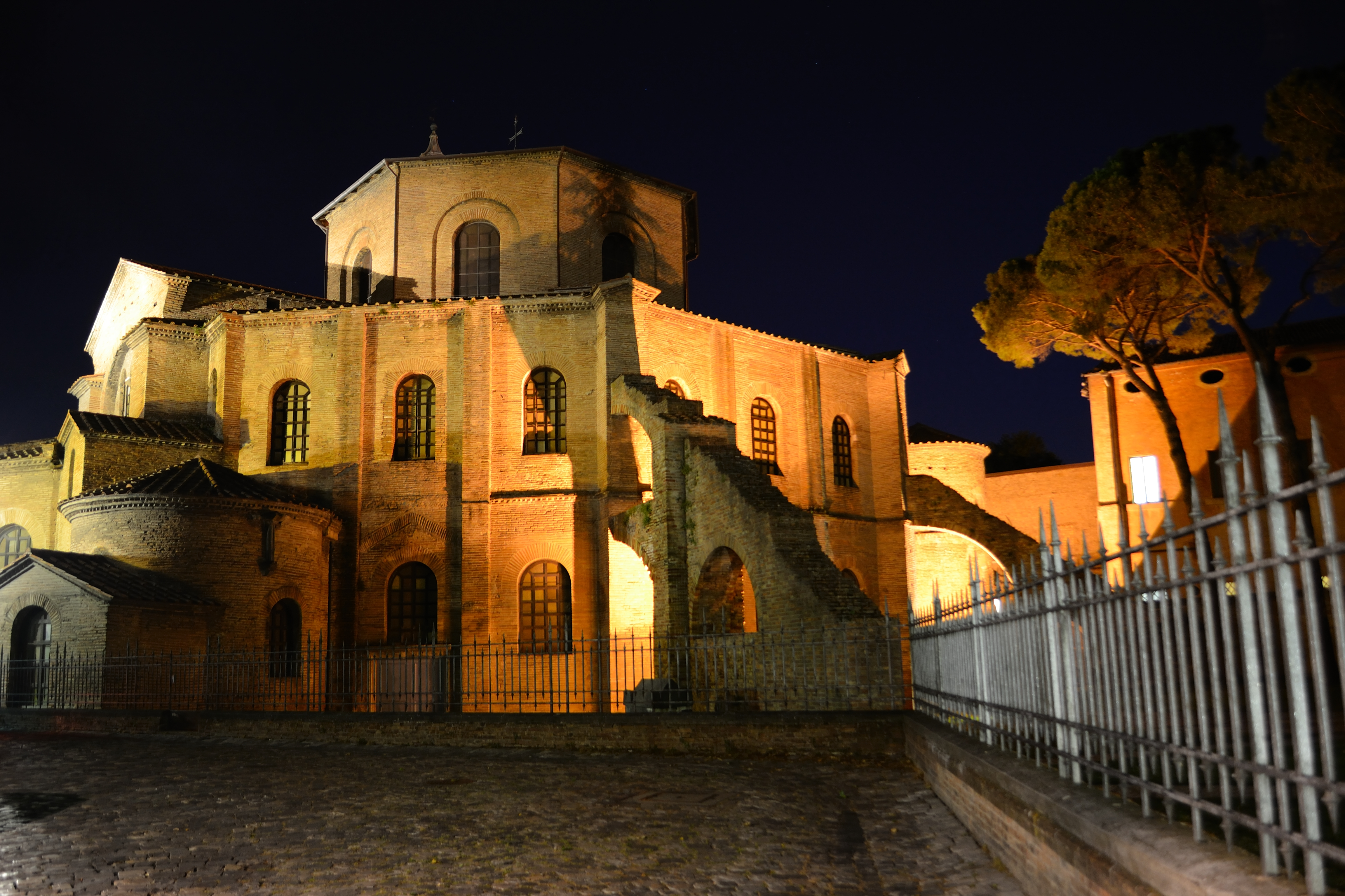 Basilica di San Vitale - MIBAC This is a photo of a monument which is part of cultural heritage of Italy.